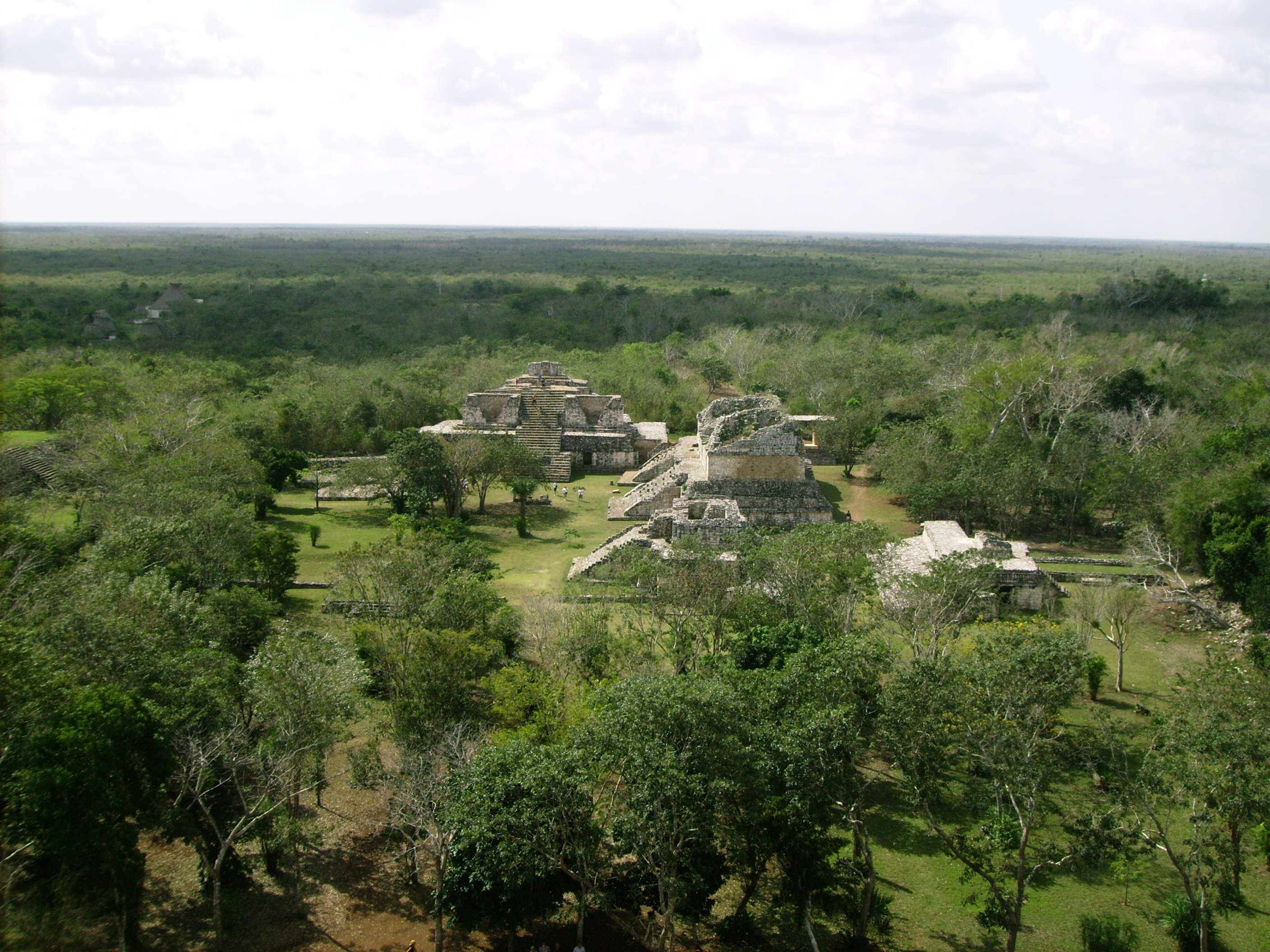 Ek Balam or Ek'Balam, Yucatán, México